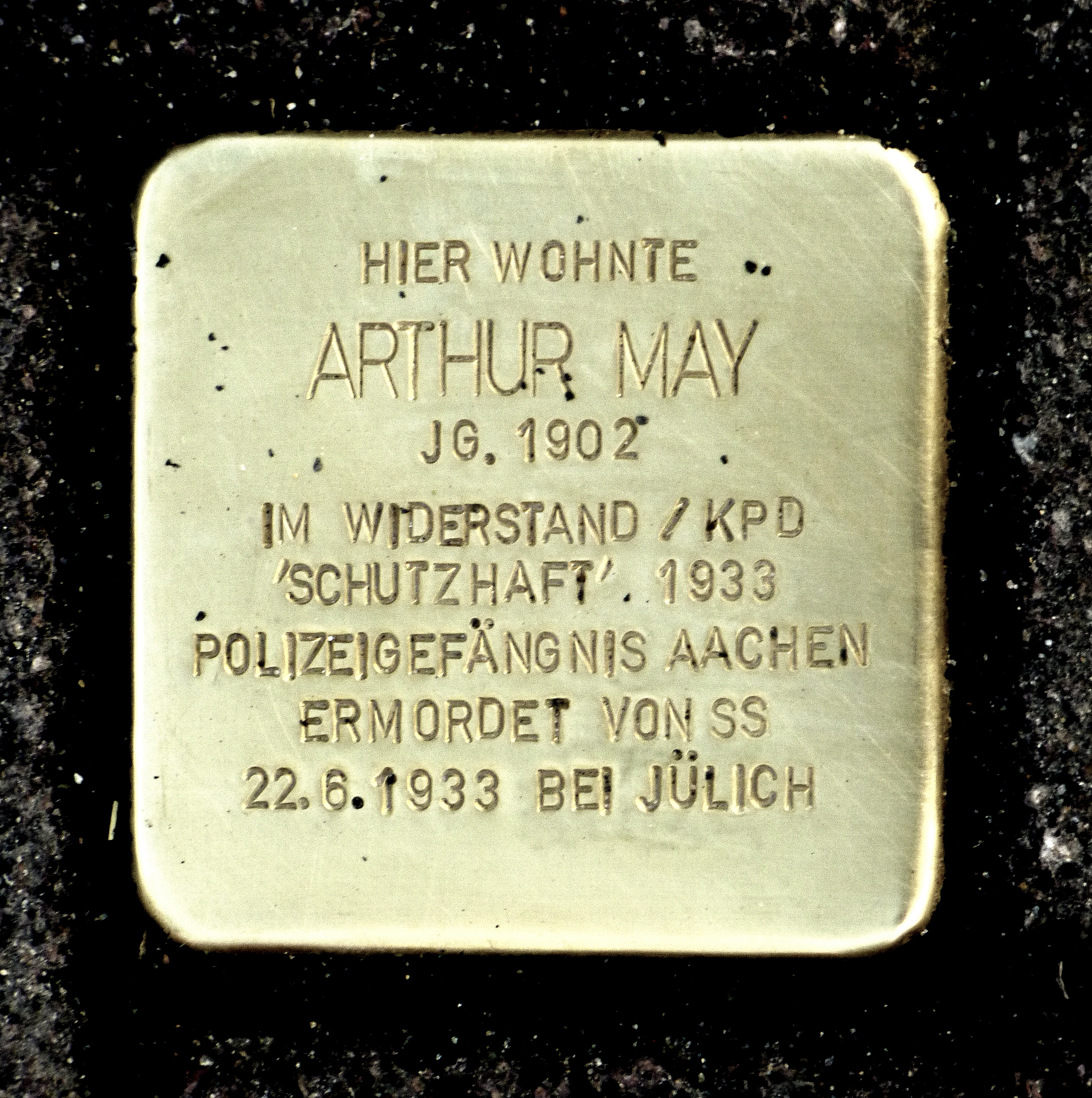 Stolperstein für Arthur May in Aachen, Muffeter Weg 57